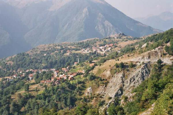 Село Върбяни, Община Маврово и Ростуша, Република Македония.